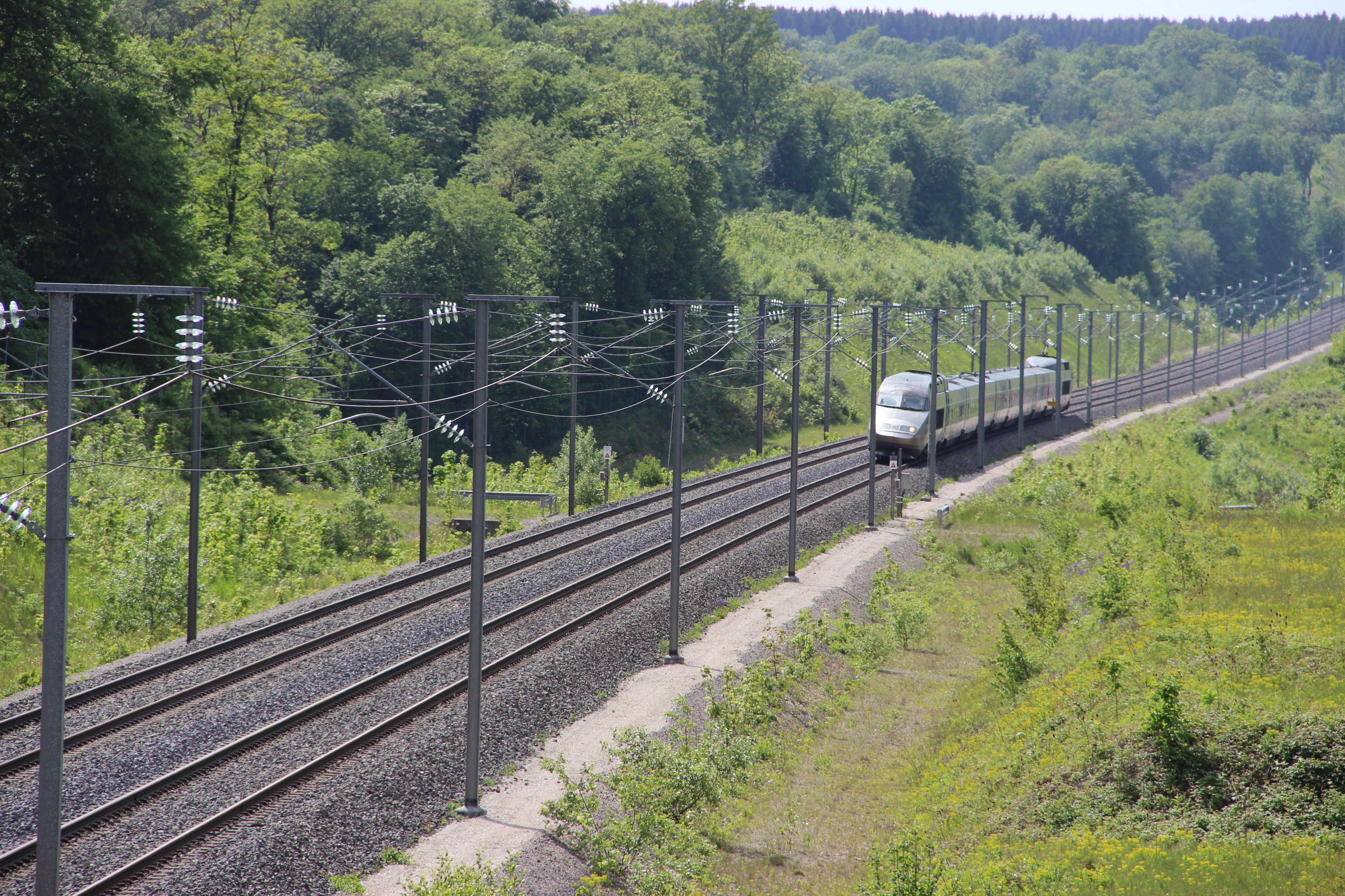 La LGV Est à Benoite-Vaux (Meuse)